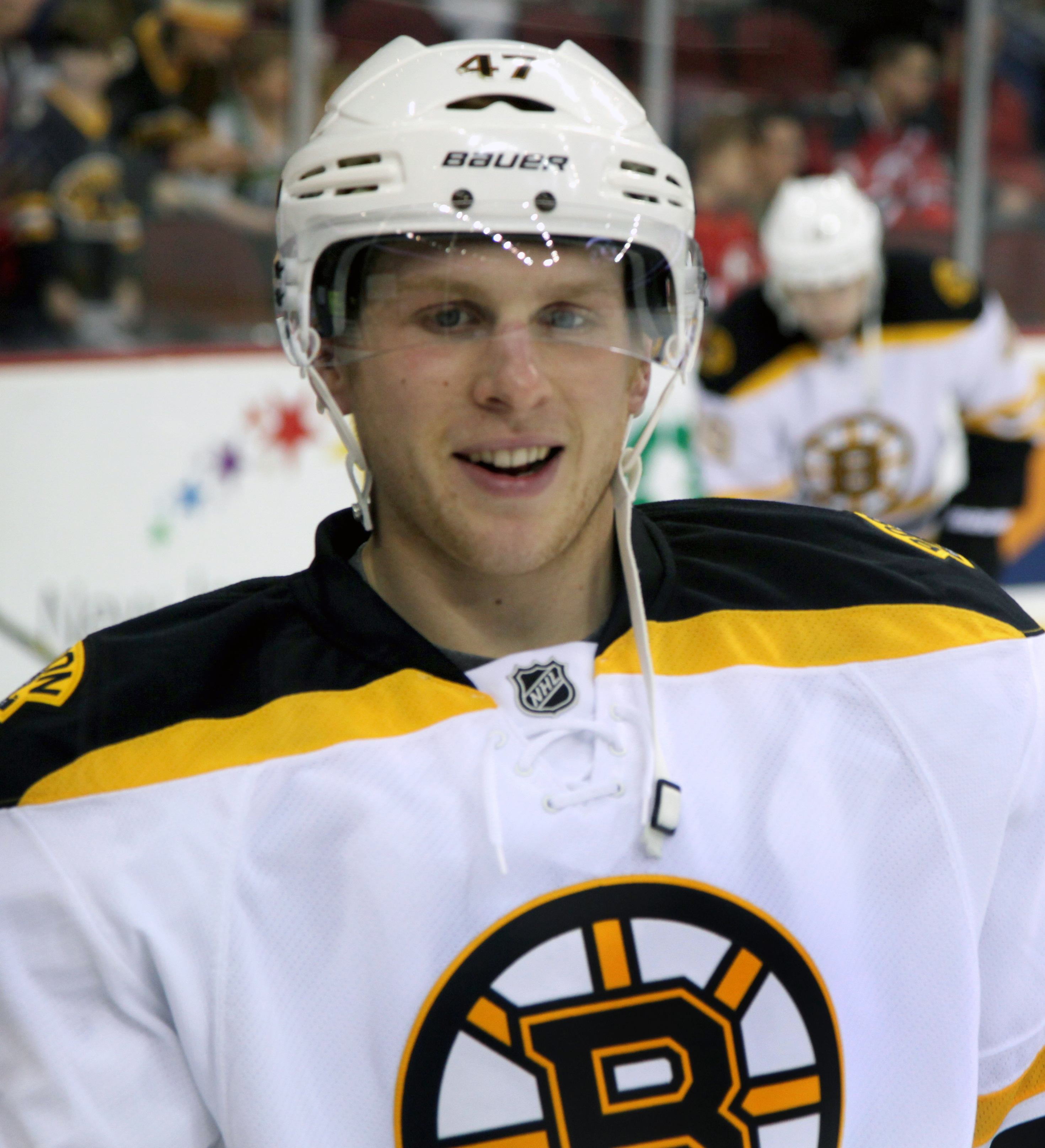 Kampfer in 2012.